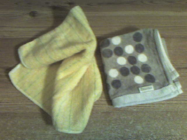 Deux mouchoirs éponges pour illuster l'article Mouchoir/sponge handkerchief from Japan.